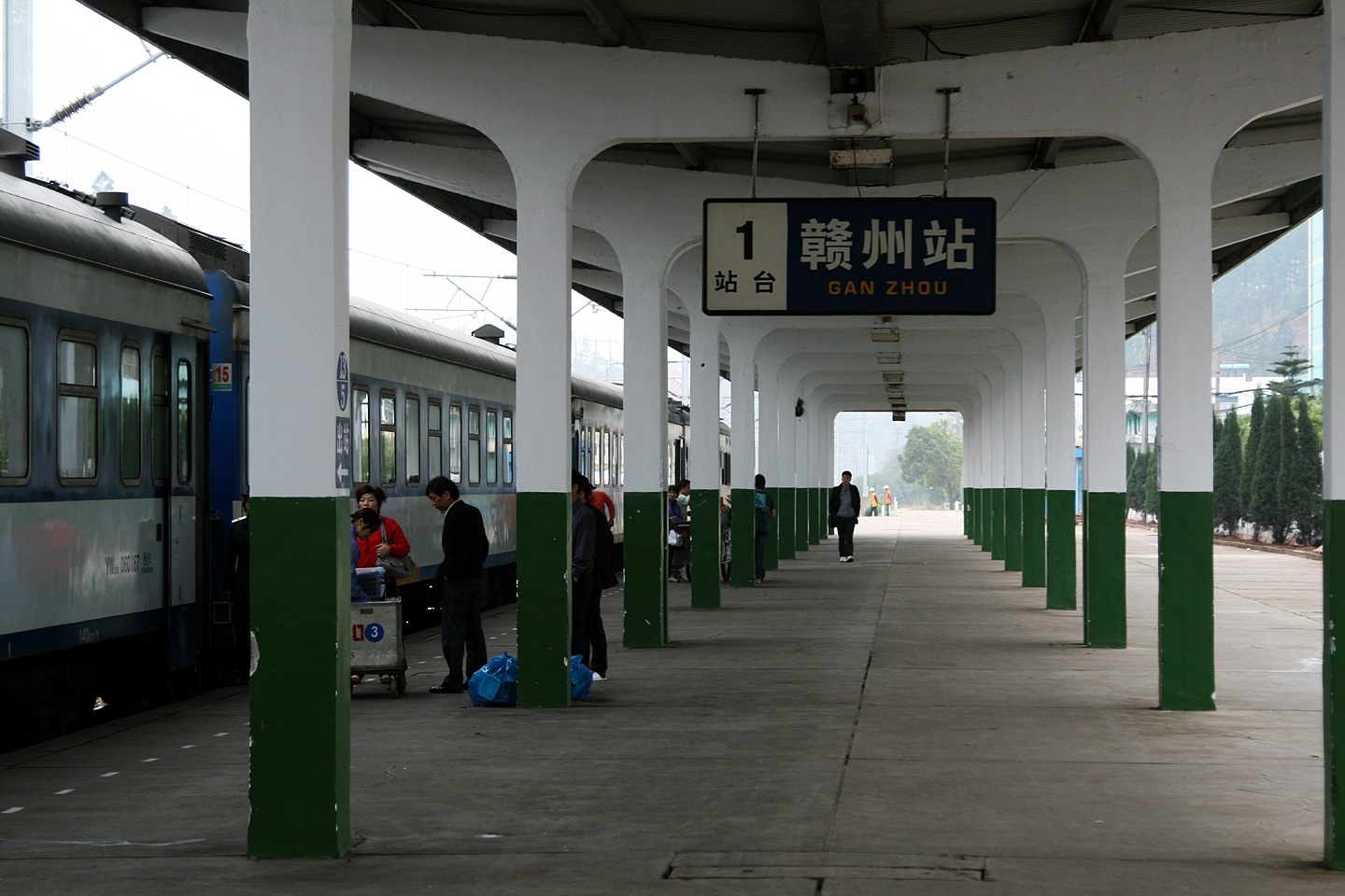 中国铁路赣州站